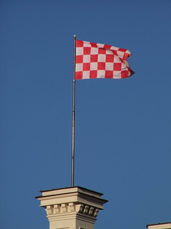 Flaga na głogowskim ratuszu.